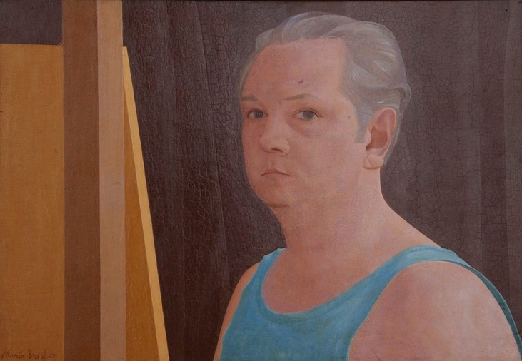 Autoritratto, olio su tela, Galleria d'arte moderna, Roma